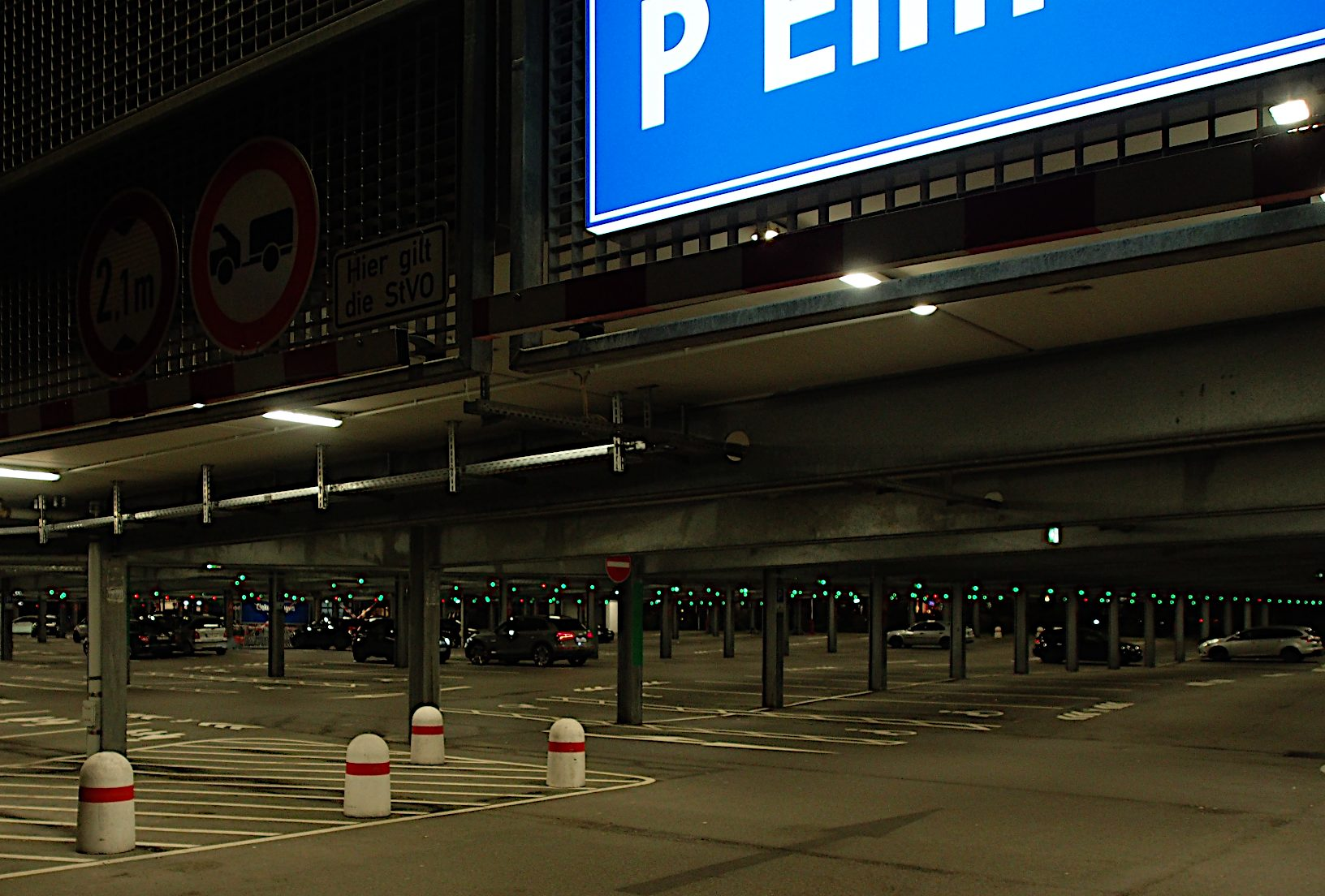 Parkhaus mit Platzbelegungsanzeige